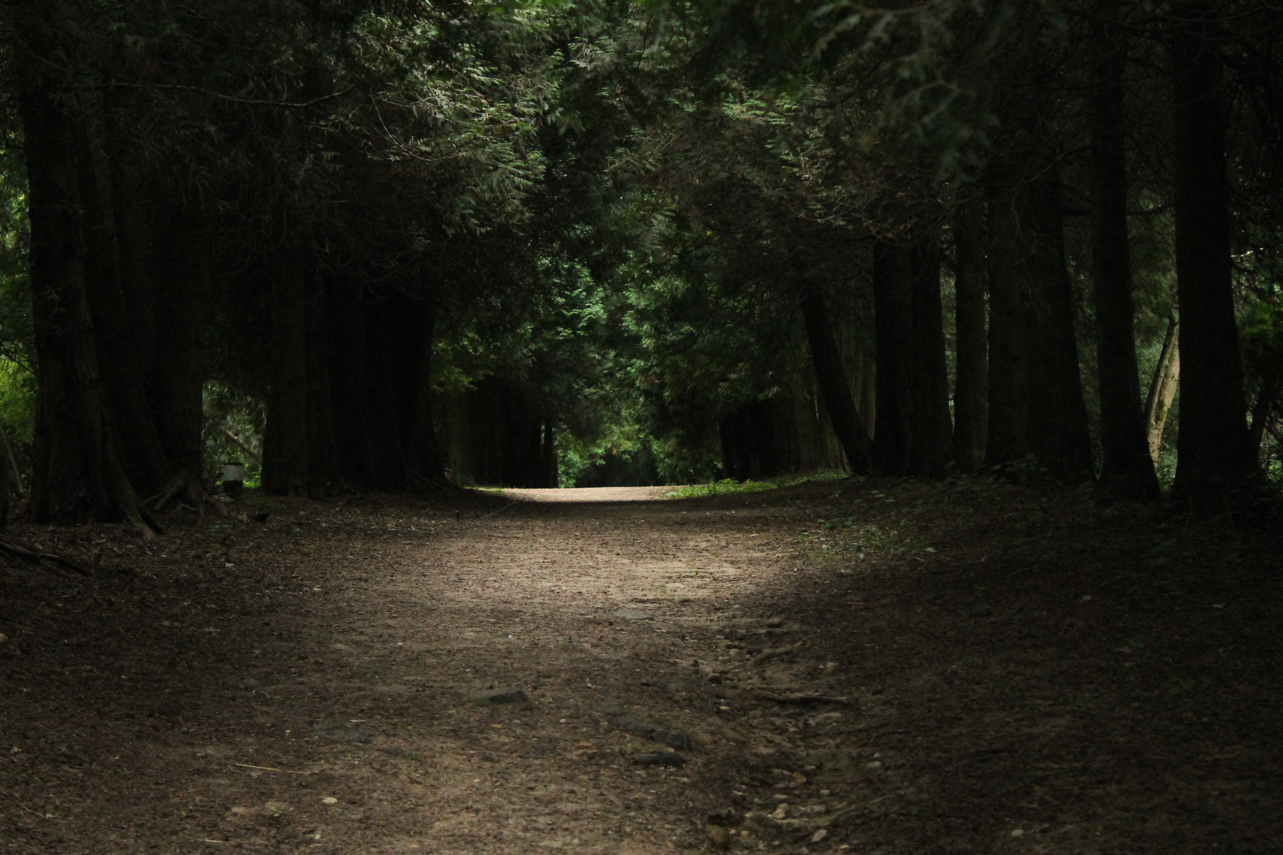 Аллея черёмухи (Bird cherry alley)